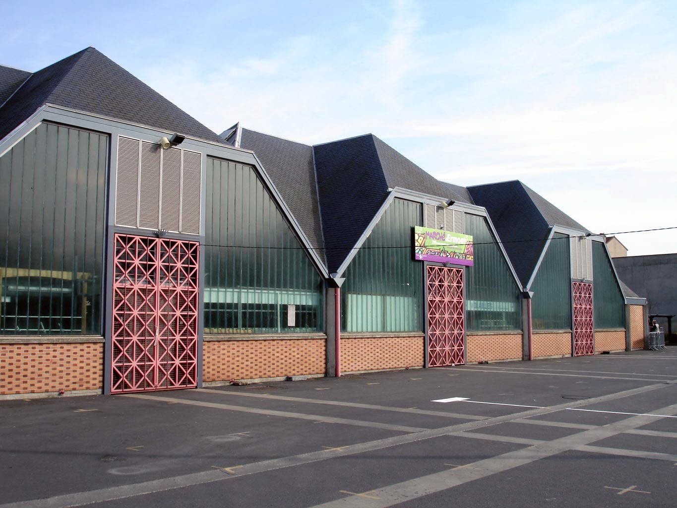 Le marché Saint-Flaive à Ermont (Val-d'Oise), France